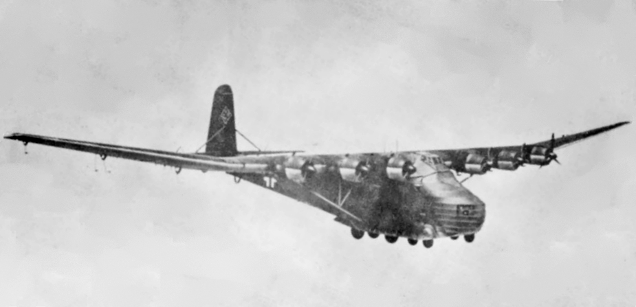 A Messerschmitt Me 323 "Gigant" in flight.